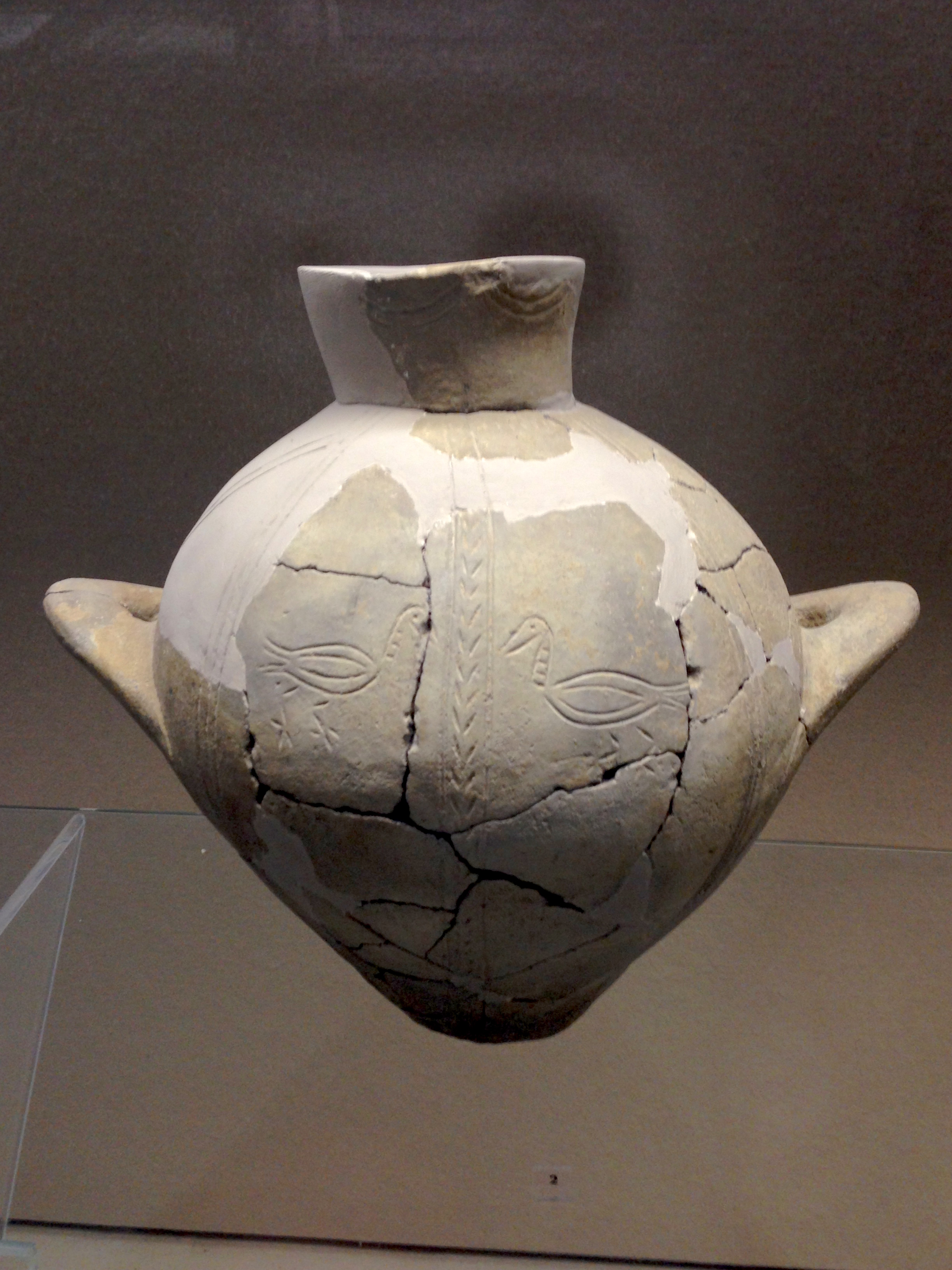 Vaso globulare biansato decorato ad incisioni con figura di uccelli. Facies di Thapsos XV-XIII sec a.C.